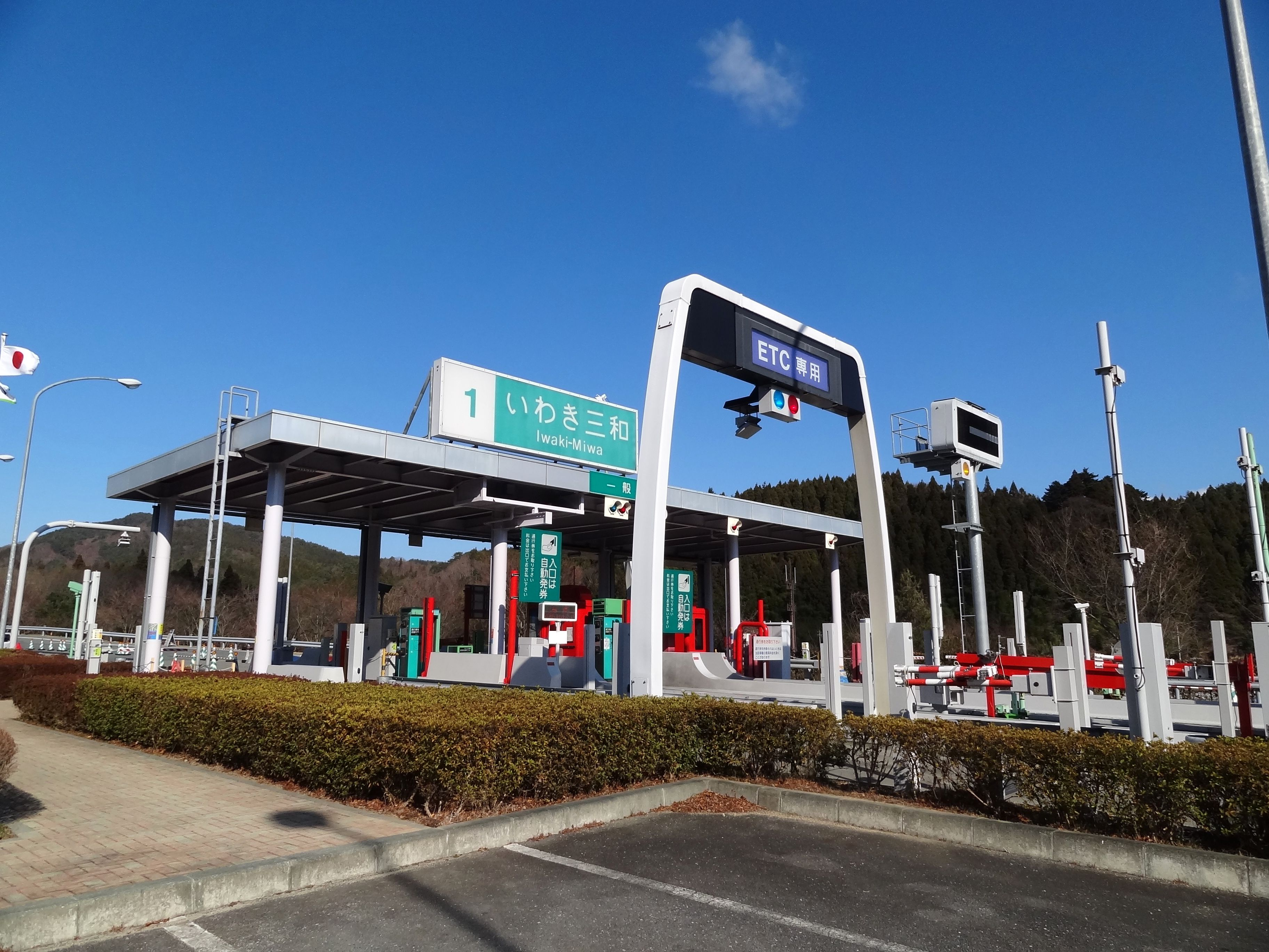 磐越自動車道 いわき三和インターチェンジ（料金所付近）